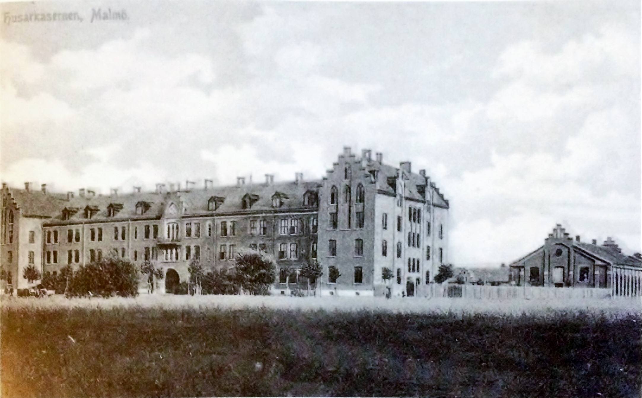 Husarkasern vid Regementsgatan 22 i Malmö. Uppförd 1898 och riven 1960.